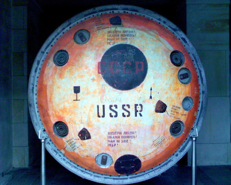 Rymdkapseln från en sovjetisk Soyuz-raket på armémuseet i Warszawa. Just den här kapseln kommer från Soyuz 30 som var bemannad av bland annat den första polska kosmonauten Mirosław Hermaszewski. Notera märkningarna med "bräckligt" och "denna sida upp"